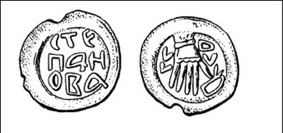 Печать посадника Новгородского Степана Твердиславовича